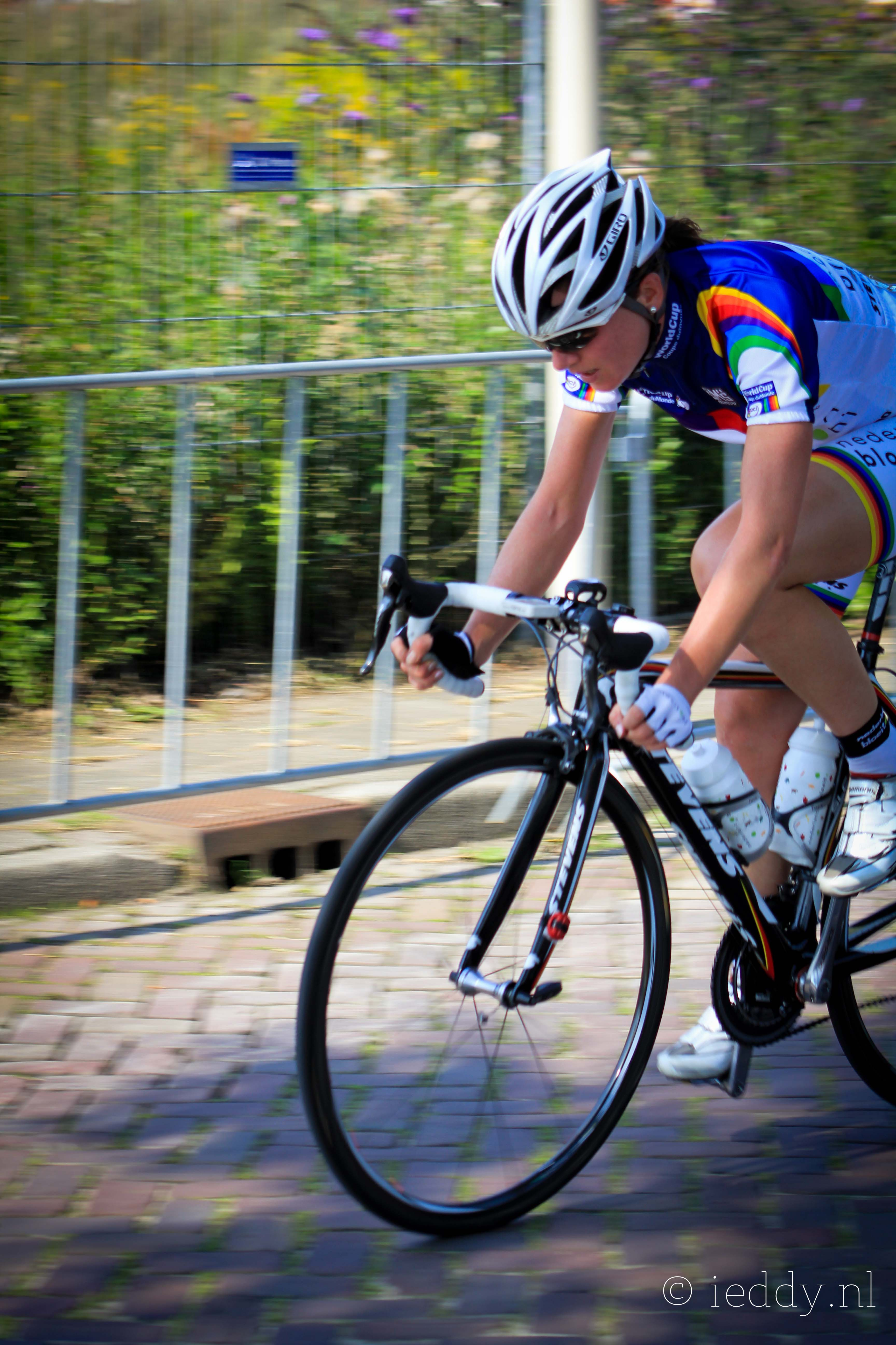 Annemiek van Vleuten Draai van de Kaai 2011